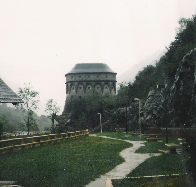 Torreta de Fusileros. Canfranc (Aragón, España).